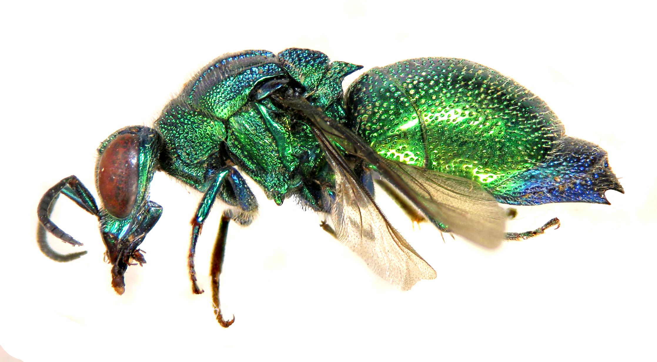 Оса-блискітка Stilbum cyanurum